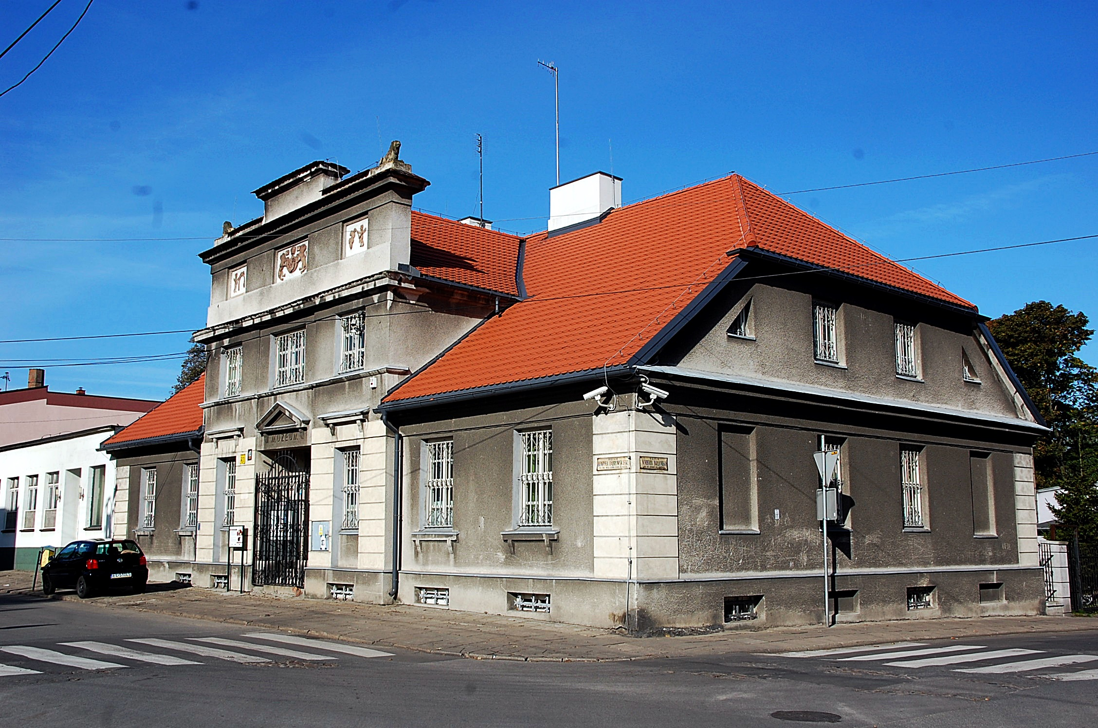 Zgierz, dom (ob. Muzeum Miasta Zgierza), 1820–1830